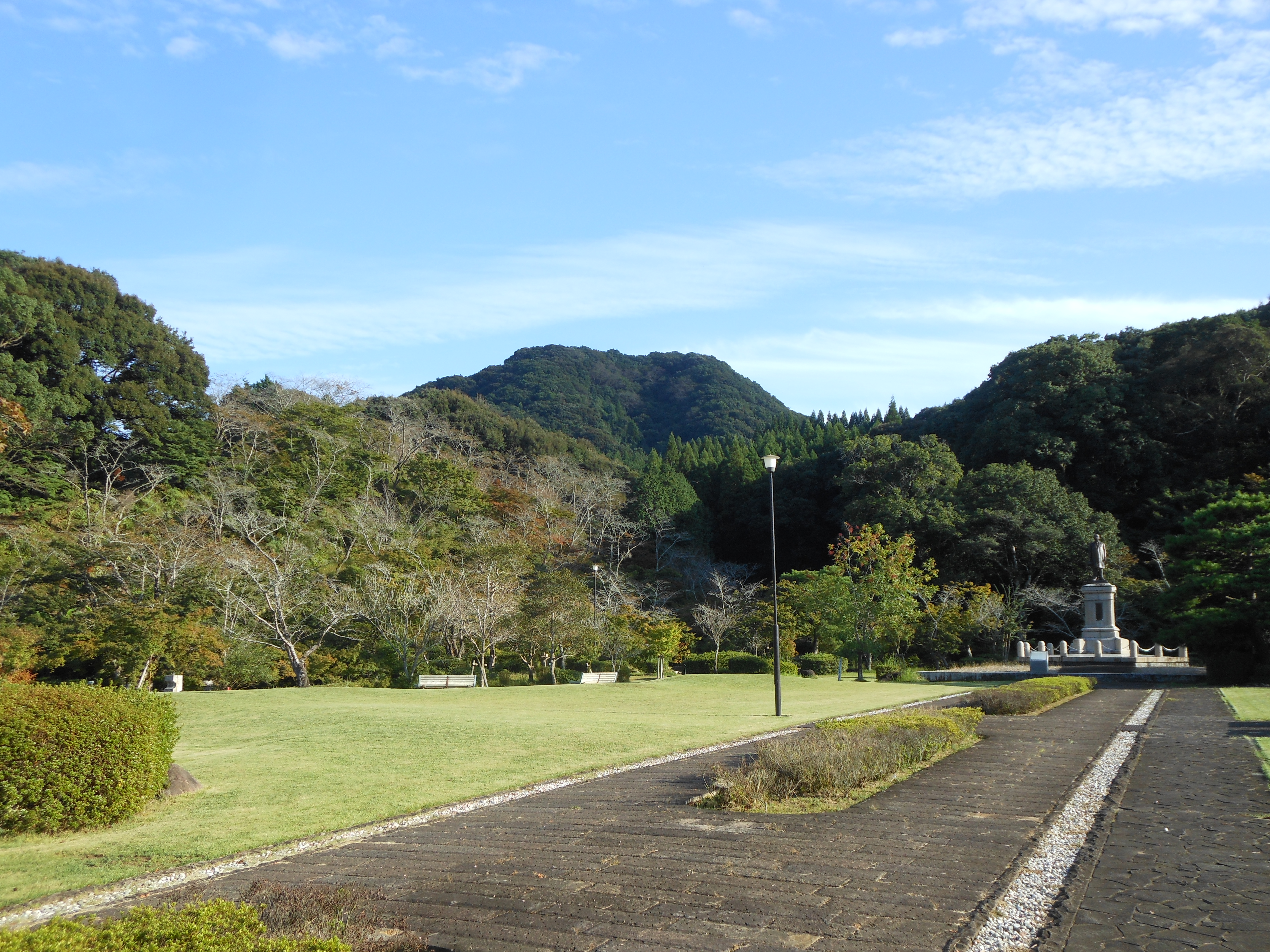 山を借景に紅葉を迎えた西渓公園の庭園と高取伊好像。A garden in autumn, and a statue at Seikei Park.